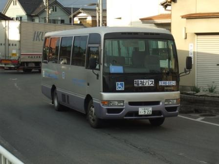 福智町福祉巡回バス